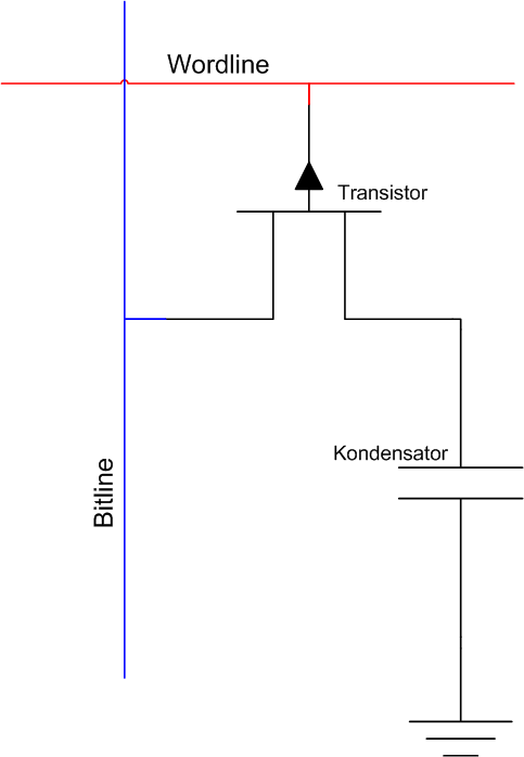 Prinzipieller Aufbau einer DRAM-Zelle